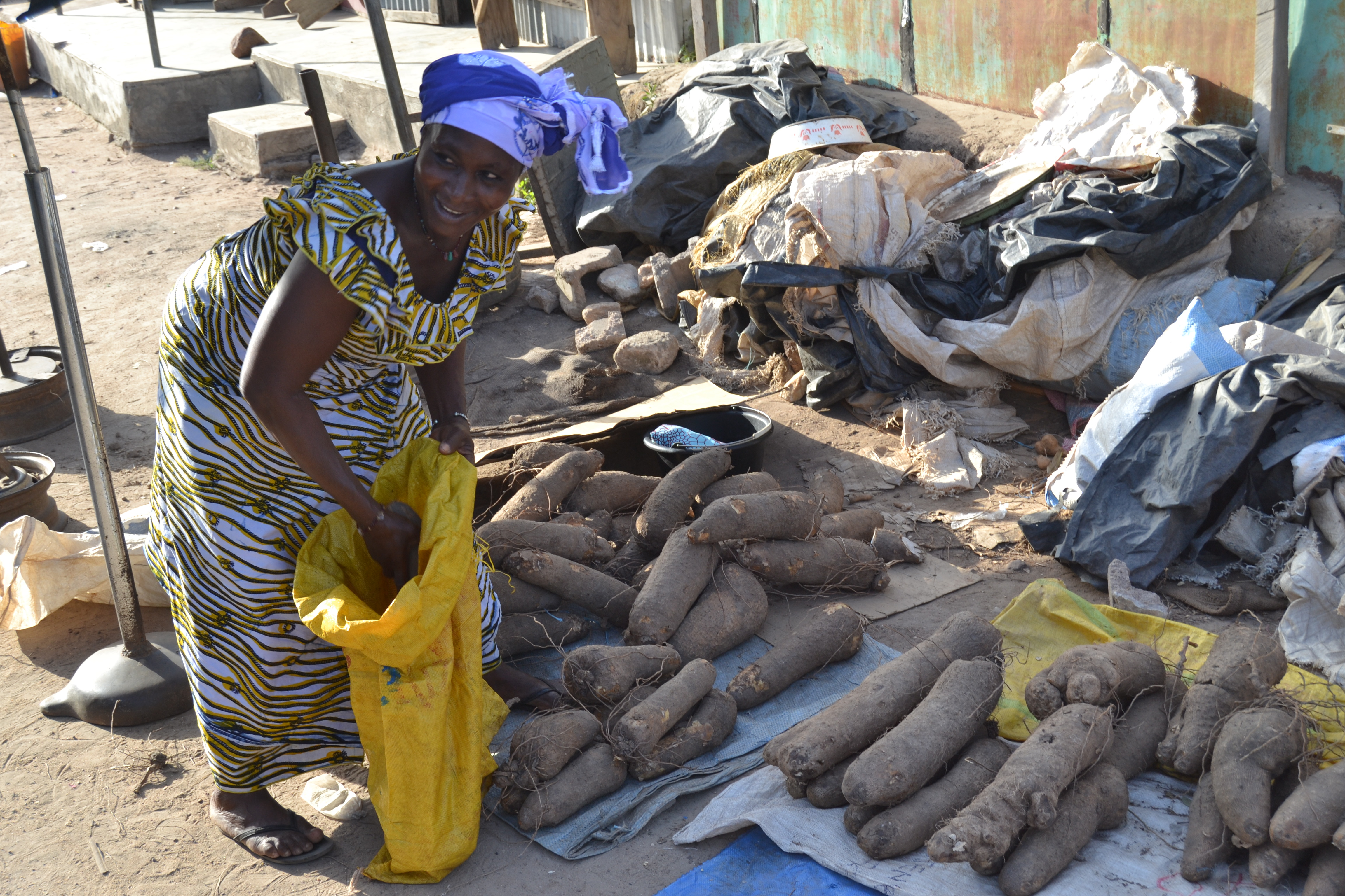 Une Vendeuse d'igname en pleine journée de travail au marché de Ferké, une ville située au Nord de la Côte d'Ivoire. La ville est à environ 600 km d'Abidjan, la capitale économique ivoirienne. This is an image of "African people at work" from Ivory Coast